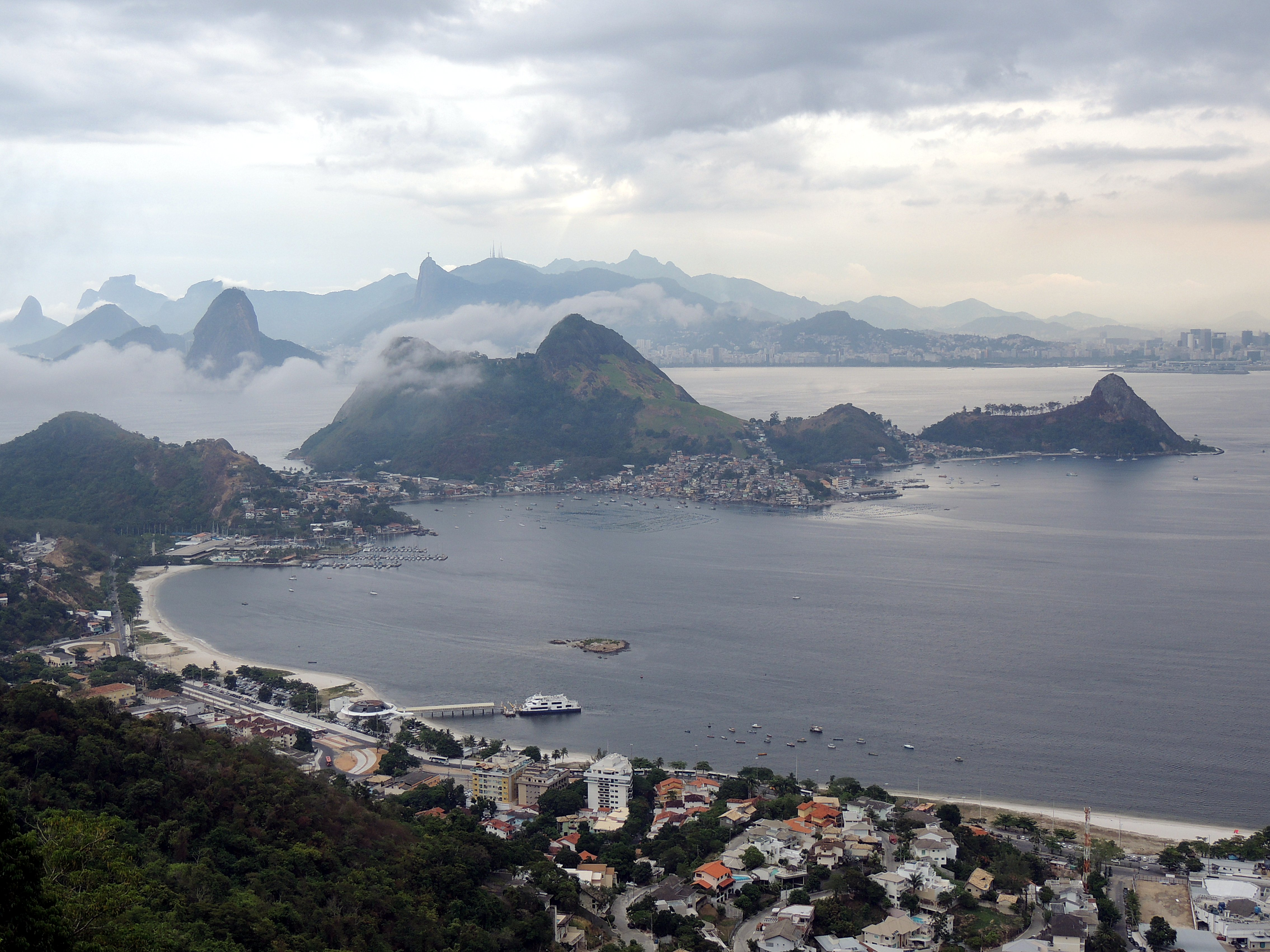 Vista do Parque da Cidade para a praia de Charitas